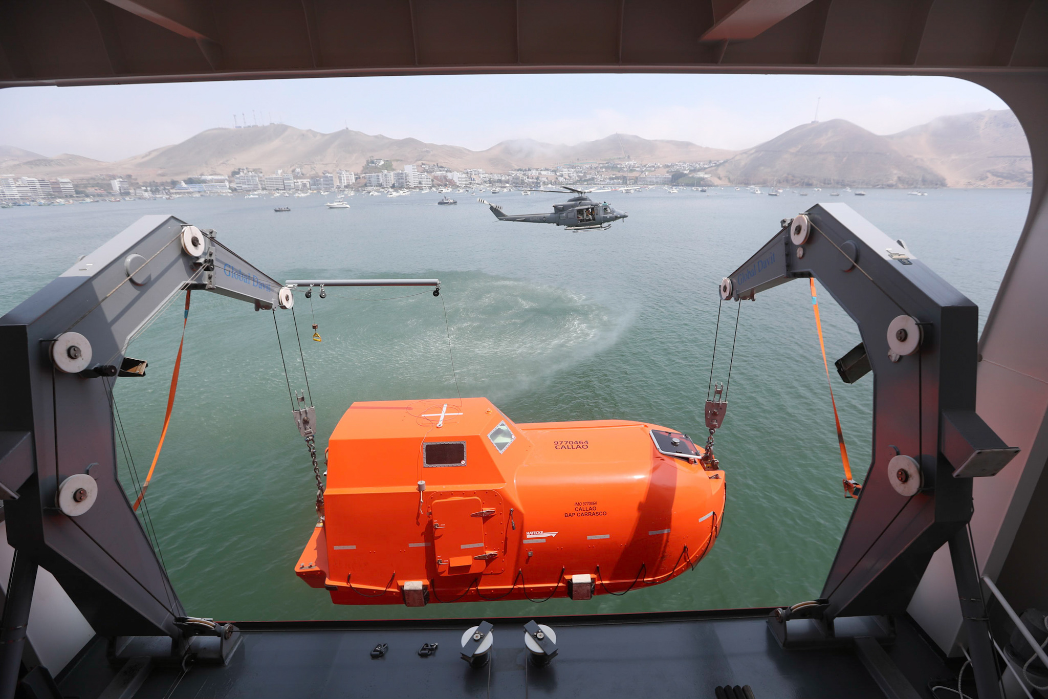 Vehículo sumergible del BAP CARRASCO